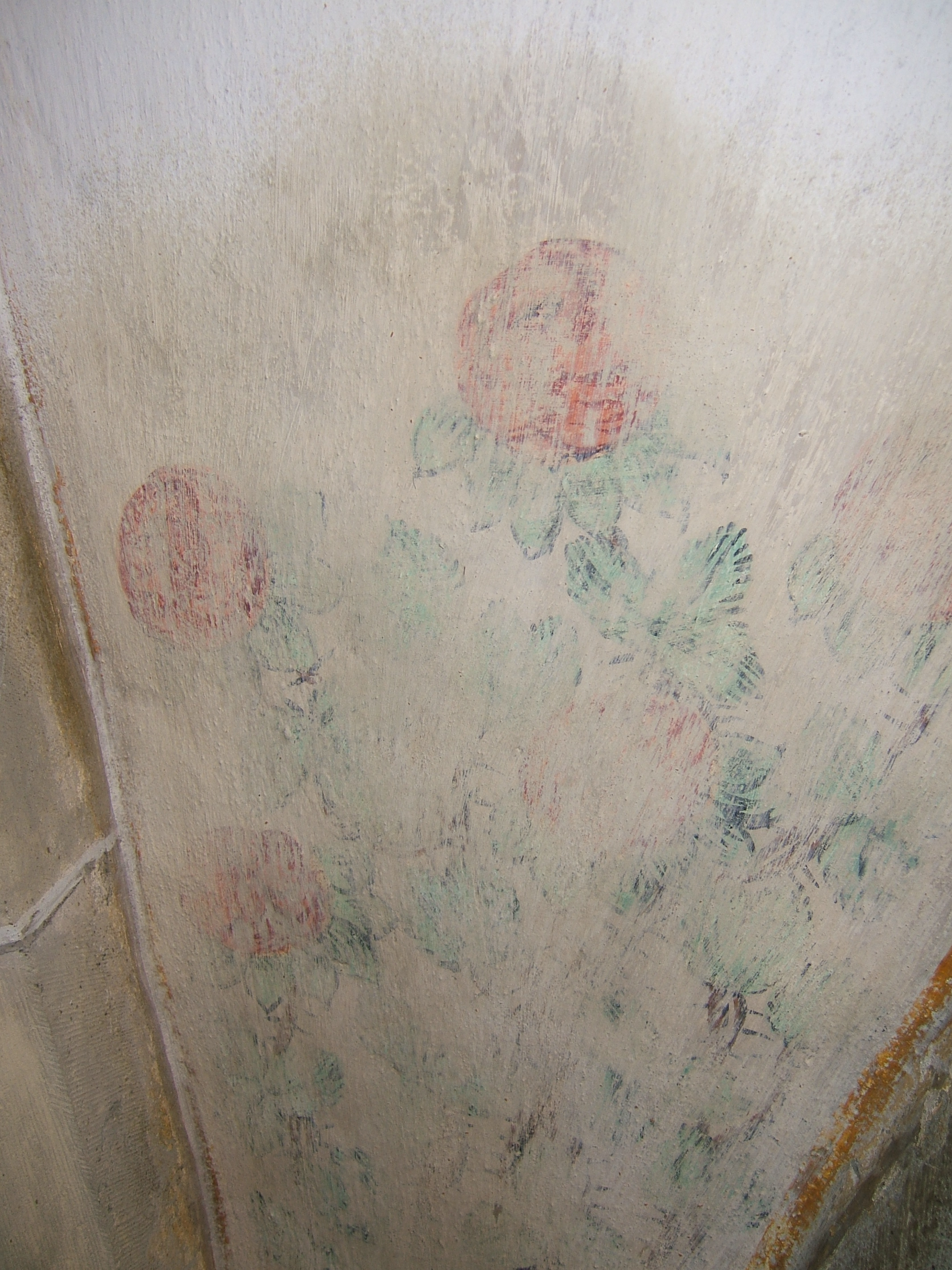 St.-Veit-Kirche Gärtringen, übermalte, ursprüngliche (um 1500) Pflanzenmalereien im Langhausgewölbe, scheinen nur bei Befeuchtung durch